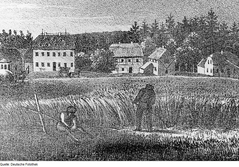 Original image description from the Deutsche Fotothek Tharandt-Grillenburg. Neuer Mühlengasthof (links)